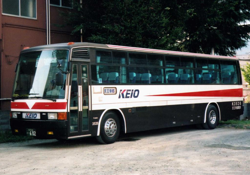 Keio Bus K3526 Mitsubishi P-MS725SA at Kawaguchiko Sta.